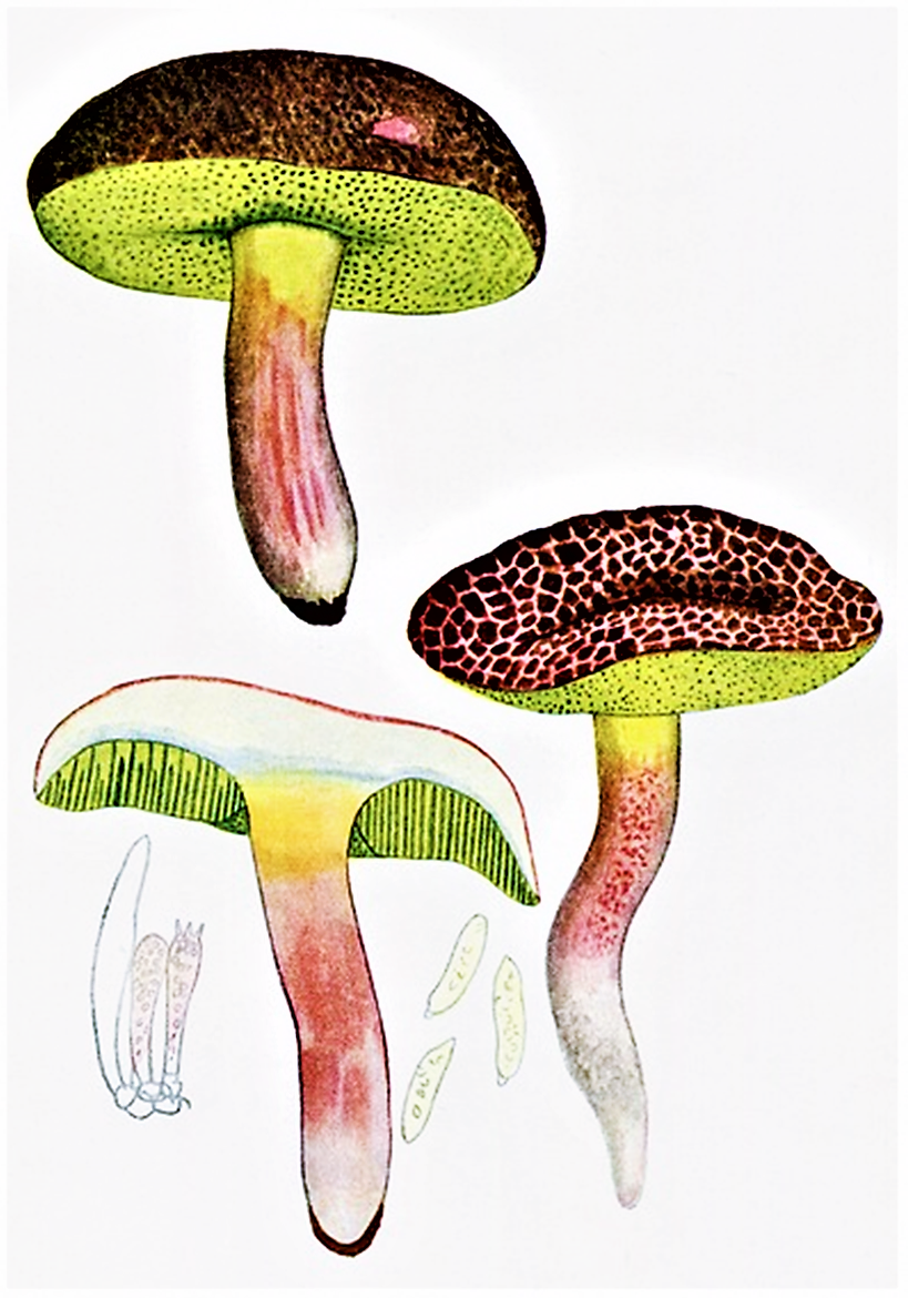 Giacomo Bresadola: Xerocomus chrysenteron (Krombh.), 1836 ex Quél. (1896), heute (Bull., 1789) Šutara (2008)